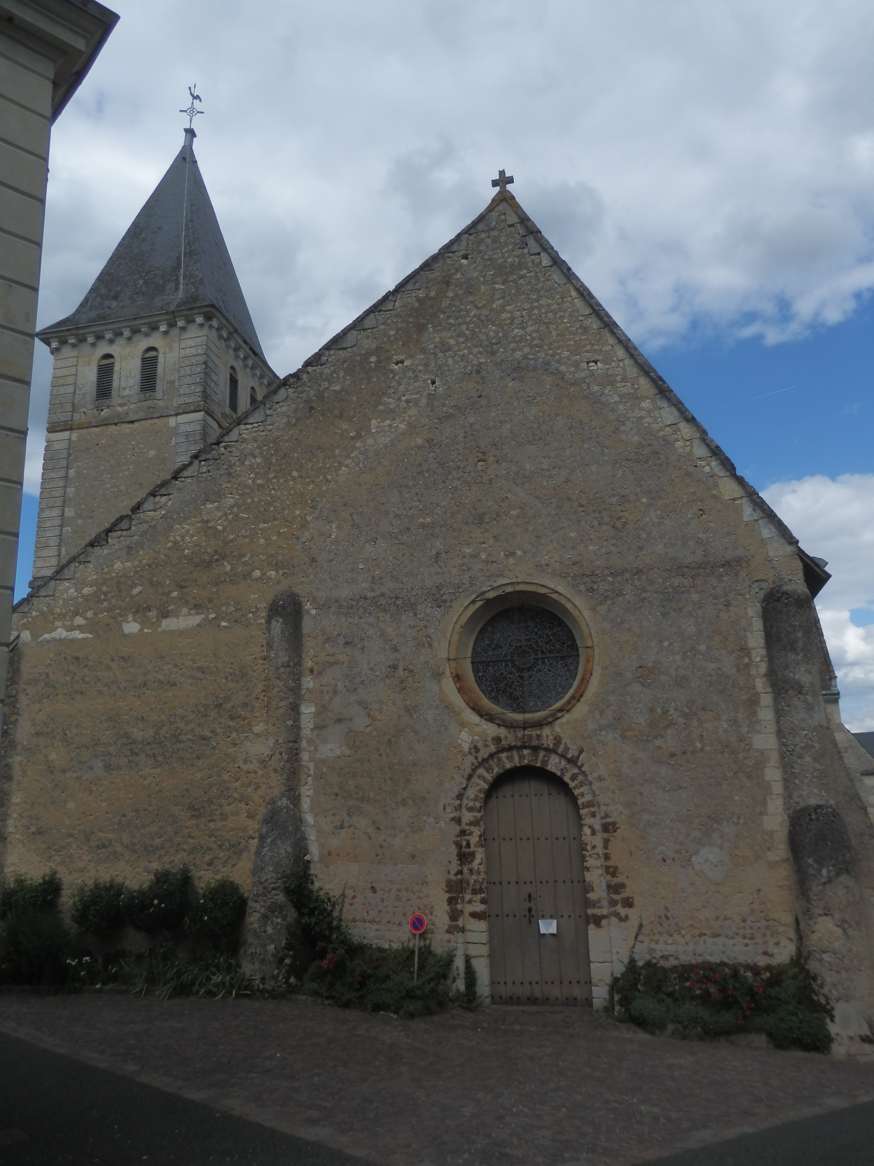 Façade Nord